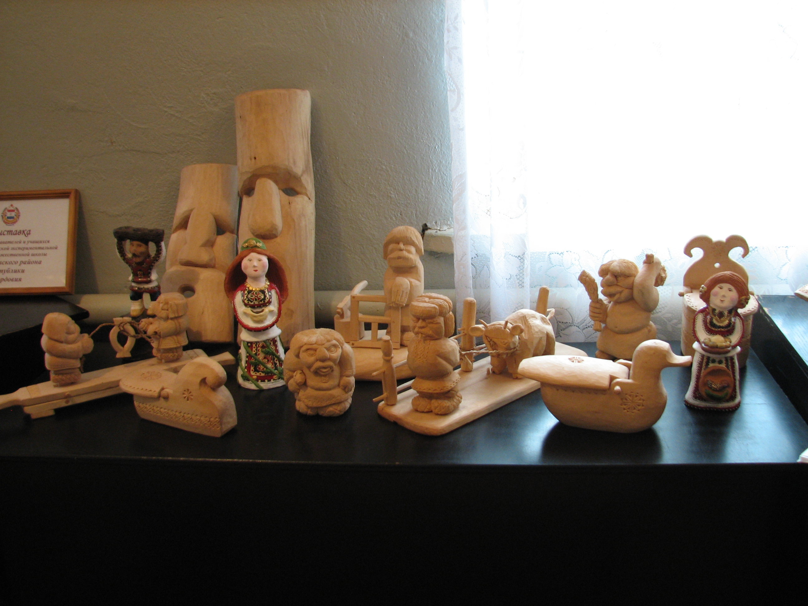 Образцы резьбы по дереву из села Подлесная Тавла (Республика Мордовия, Россия).